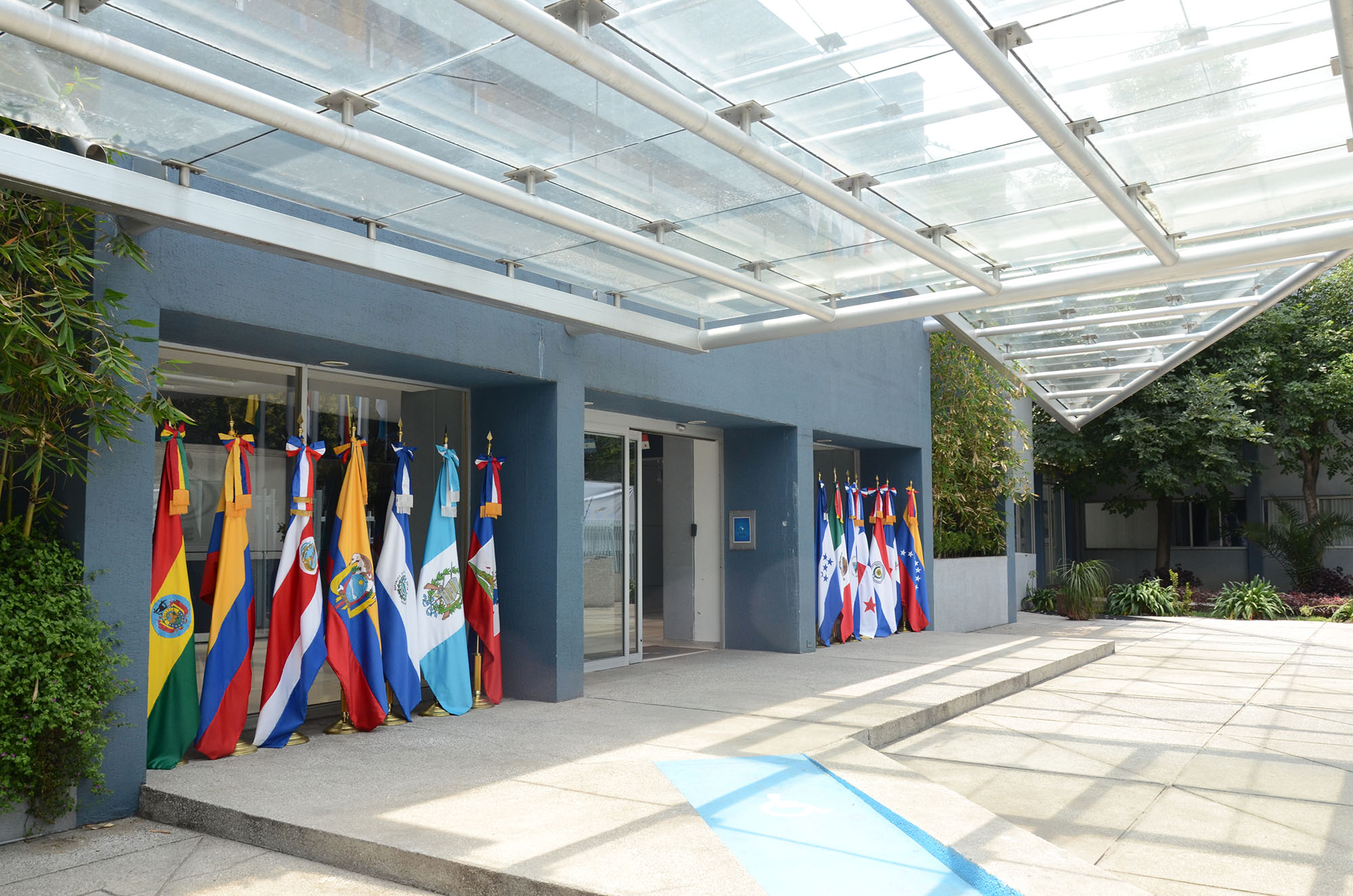 Acceso a las instalaciones del Instituto Latinoamericano de la Comunicación Educativa en la Ciudad de México.